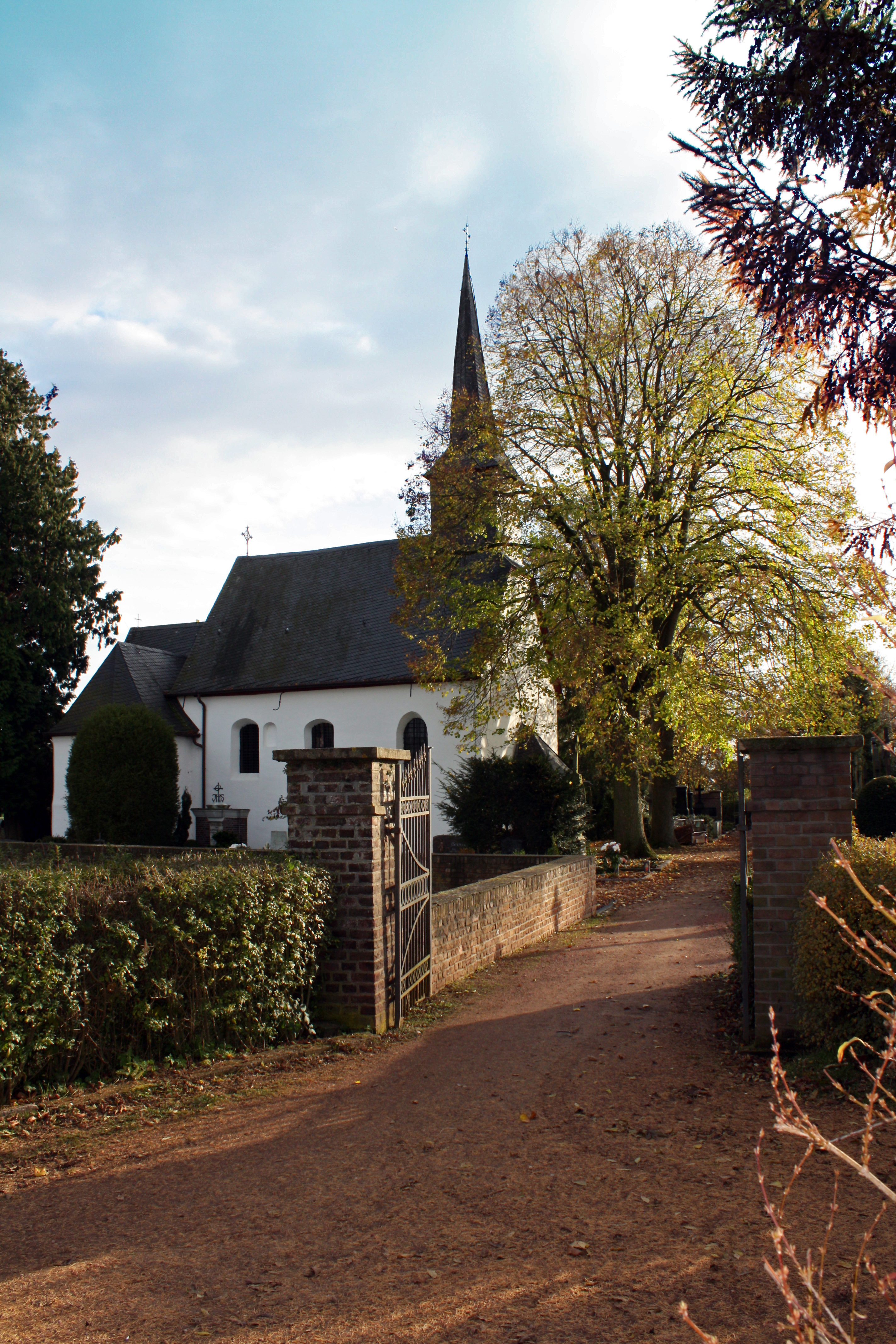 Lechenich, Heddinghoven. St. Servatius Kapelle